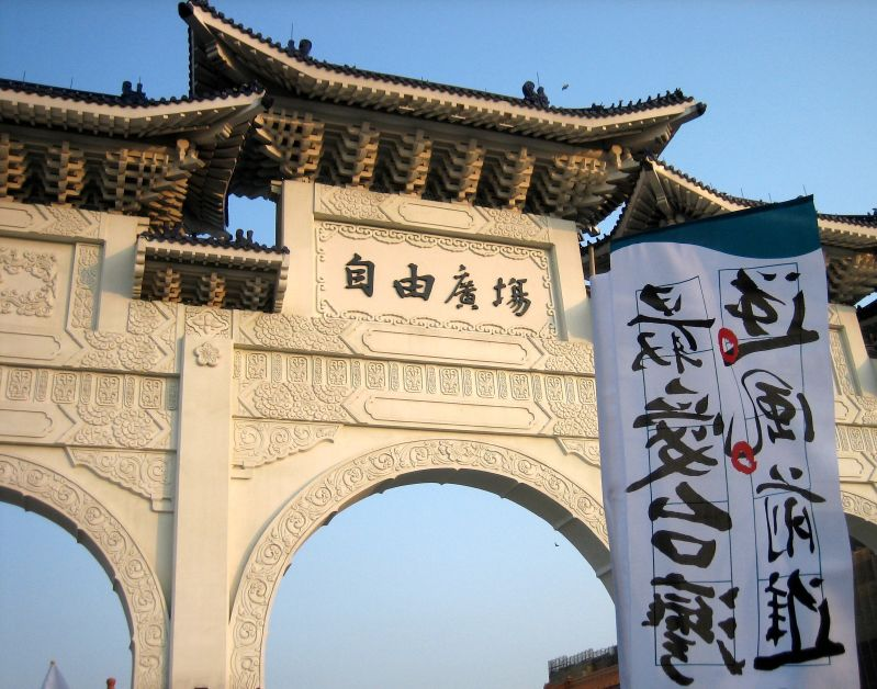 中文（台灣）: 逆風前進最愛台灣@中正紀念堂自由廣場